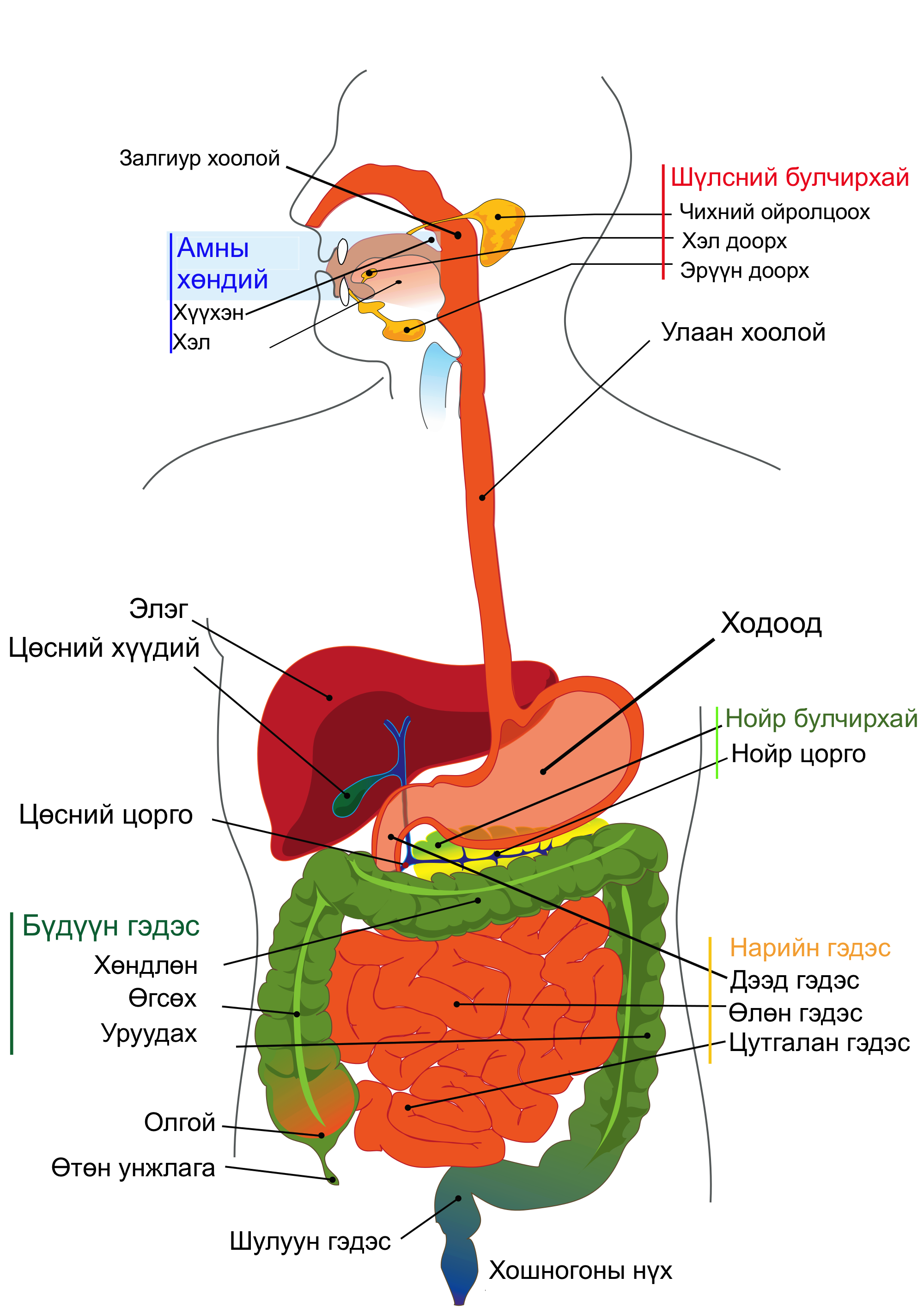 Монгол: Хоол боловсруулах системын зураг